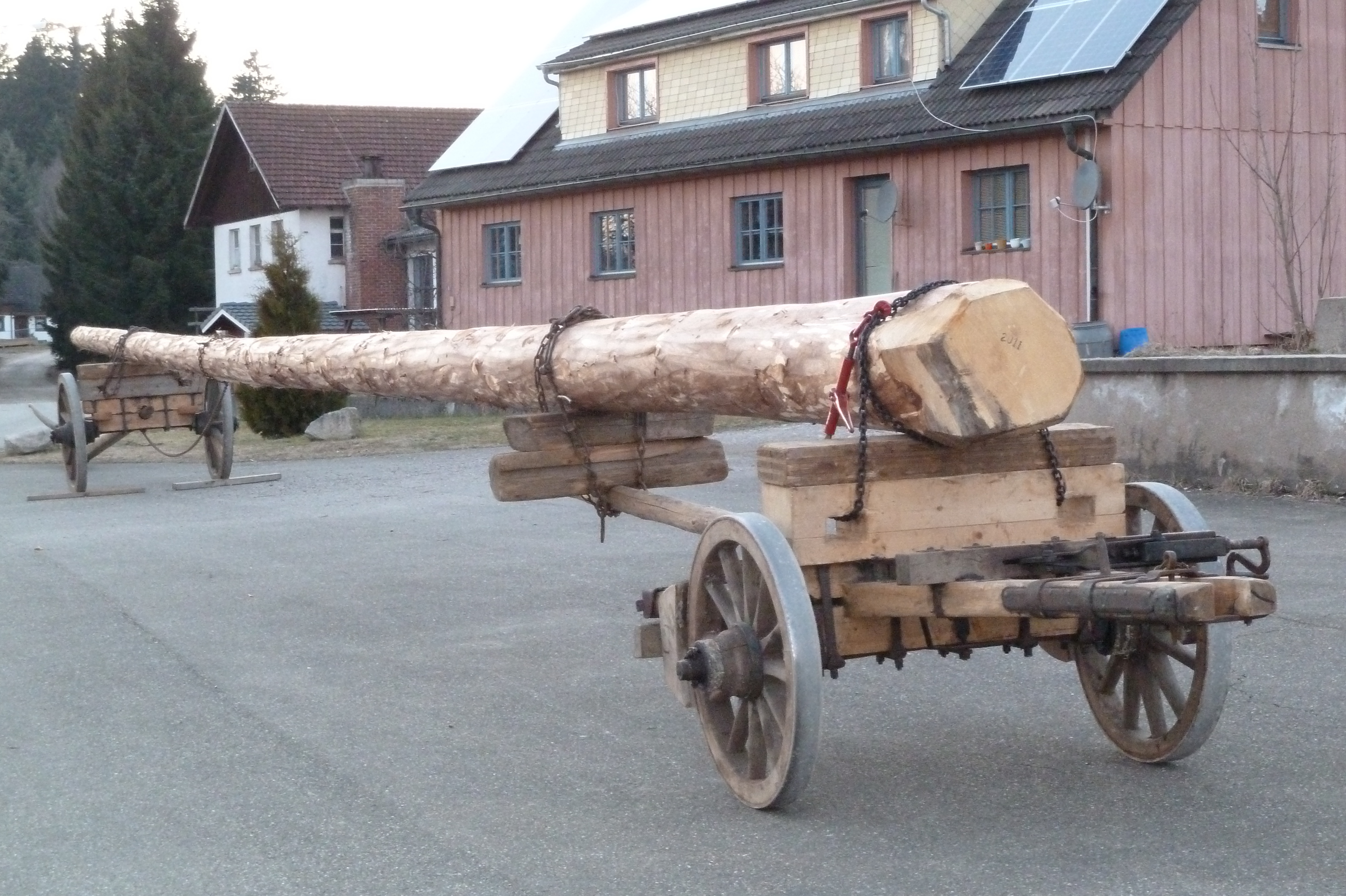 Narrenbaum von Bonndorf kurz vor dem Aufstellen